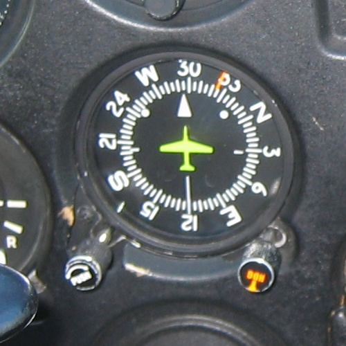 Panel for Altitude Alert